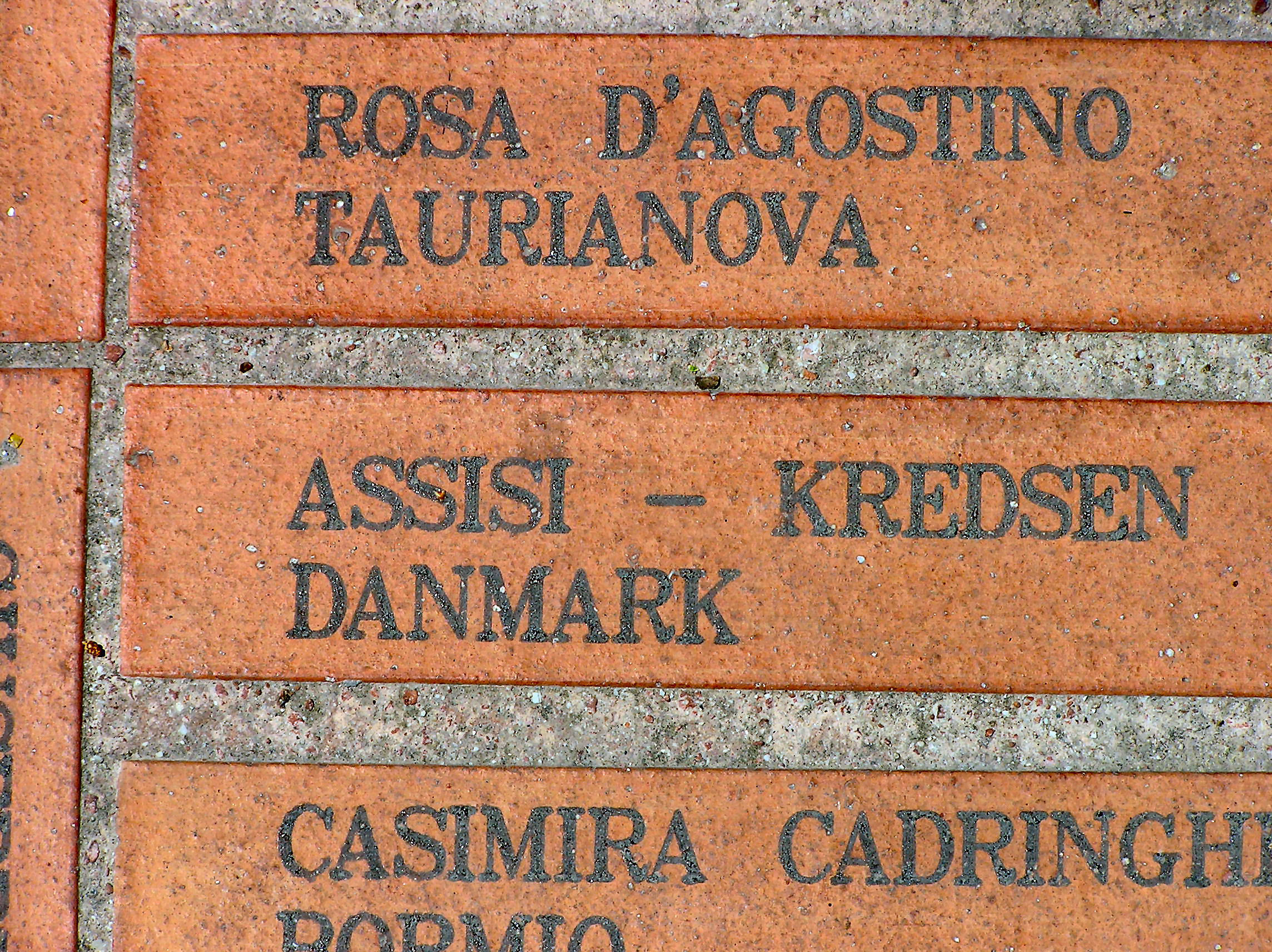 Assisi Pilgrim path